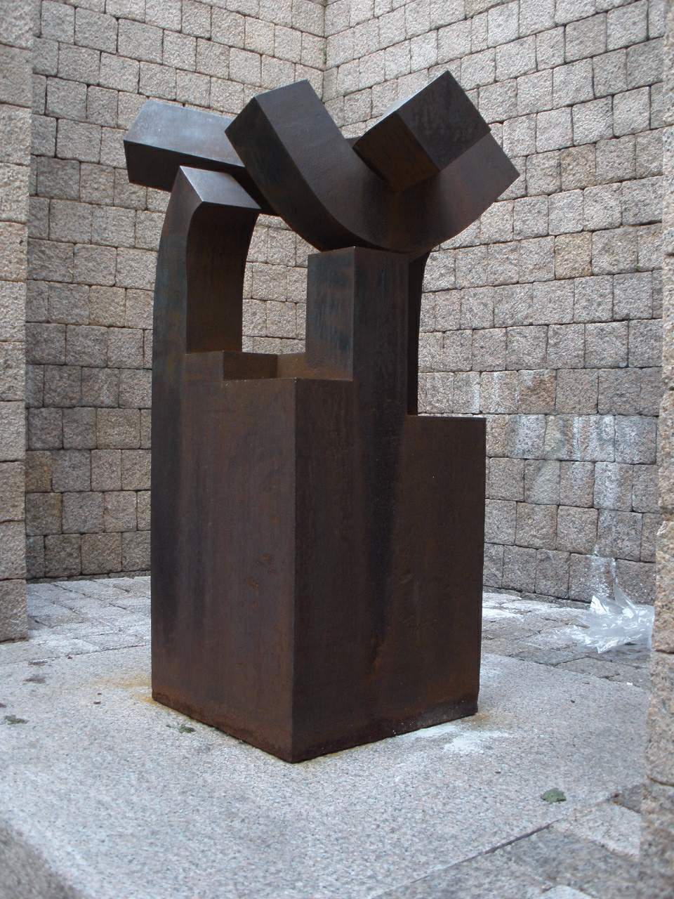 Vitoria-Gasteiz - Plaza de los Fueros, estatua de Chillida